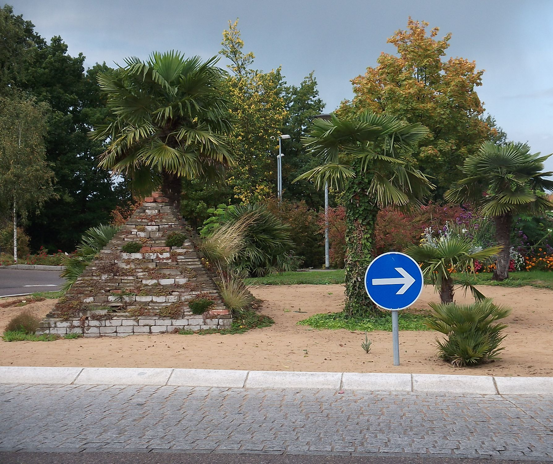 Kreisverkehr mit Steinpyramide und Palmen